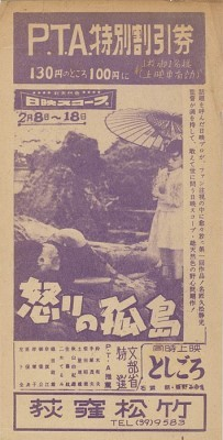 PTA特別割引券、荻窪松竹劇場、1958年1月発行